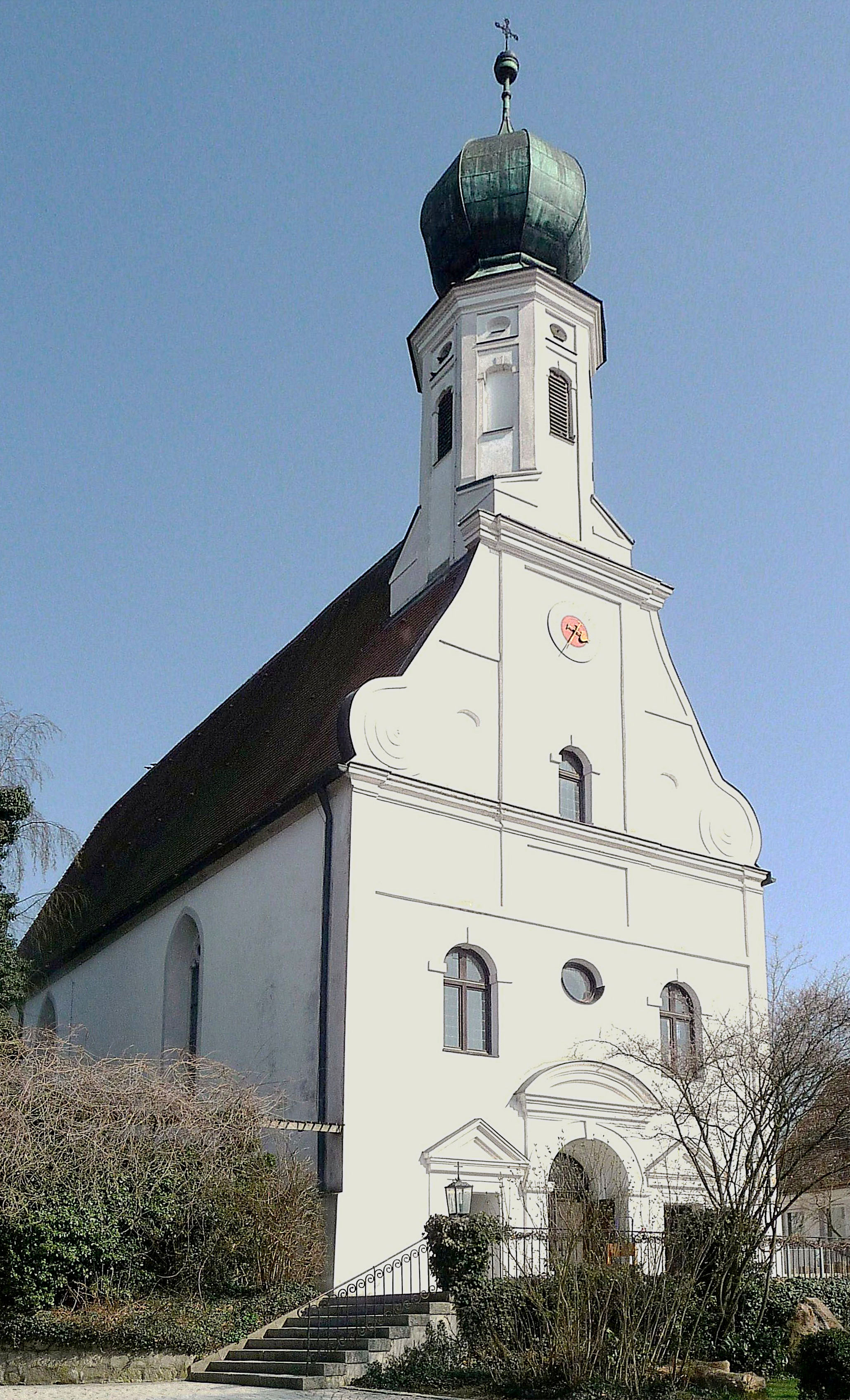 Die evangelische Marktirche in Ortenburg